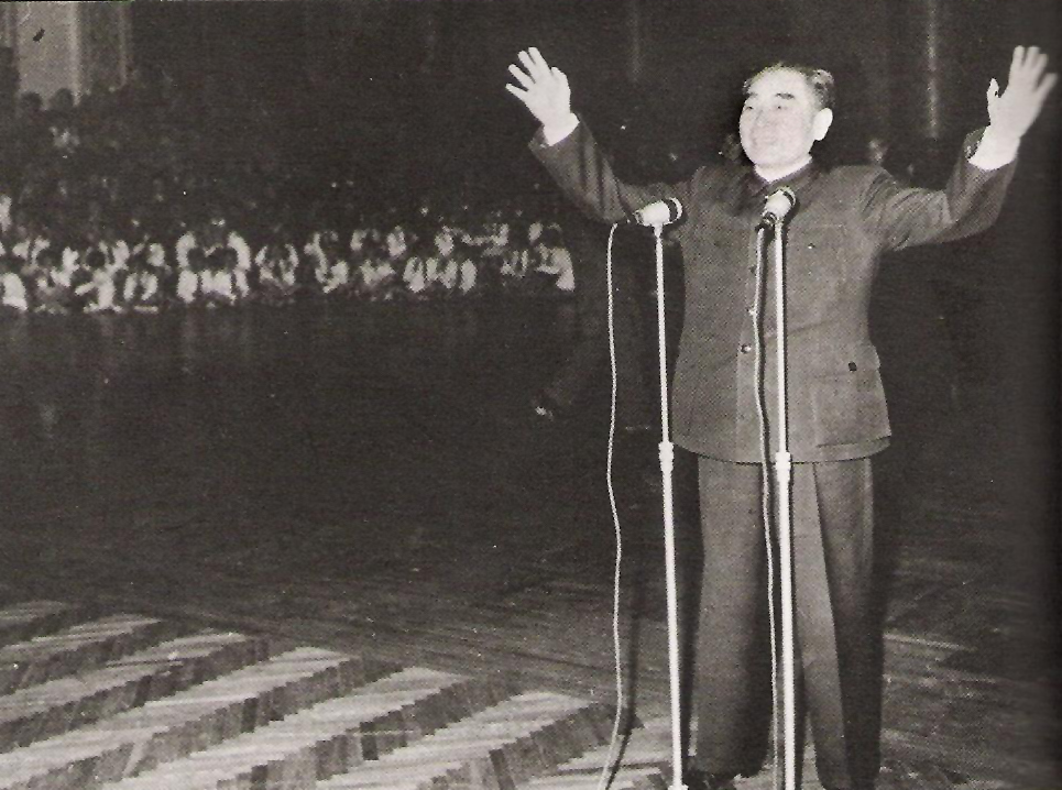 1964年10月16日，周恩來對《東方紅》歌唱團員宣佈中國成功爆炸了第一顆原子彈